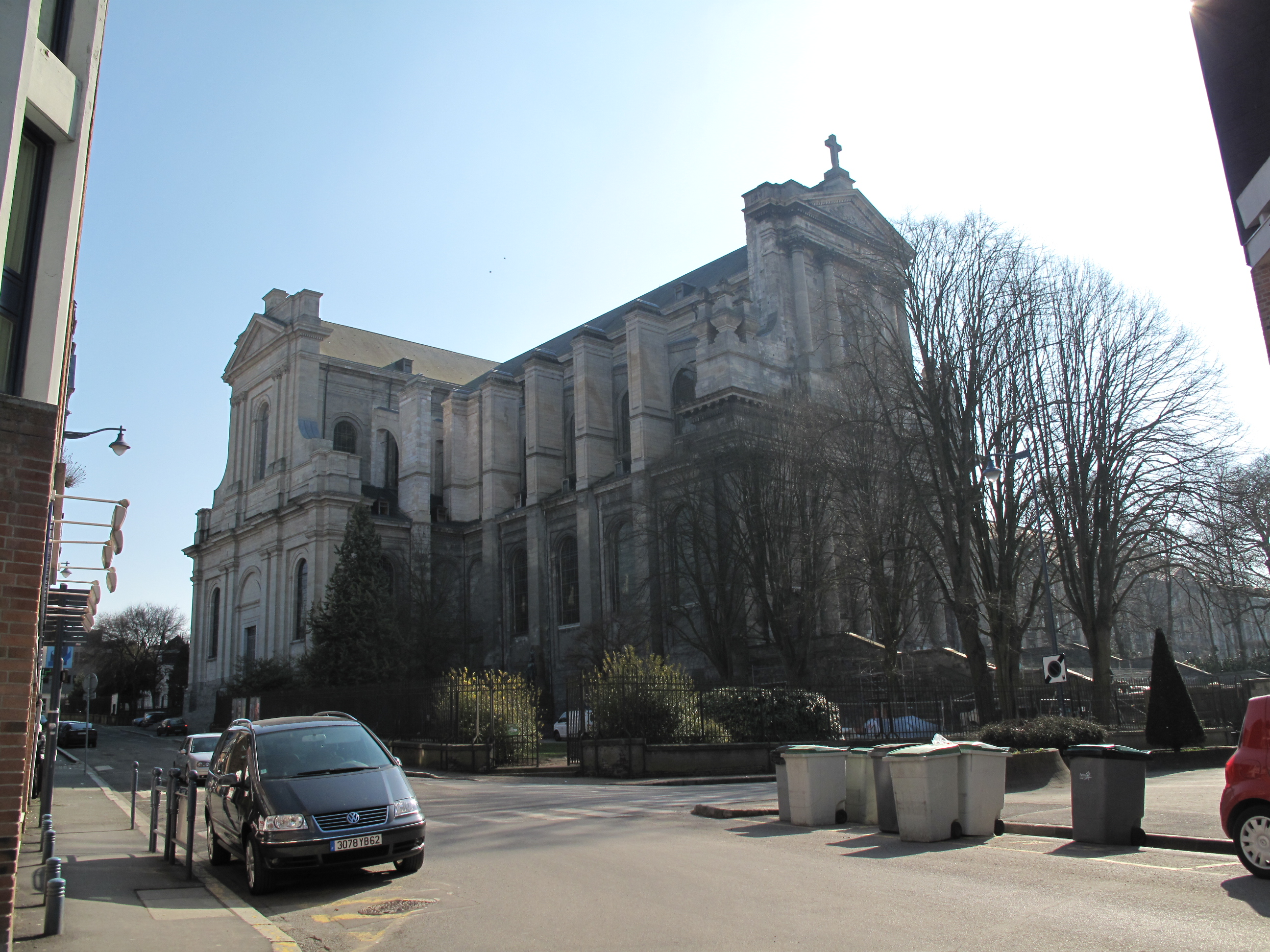 Ancienne église de l'abbaye de Saint-Waast - Ville d'Arras .